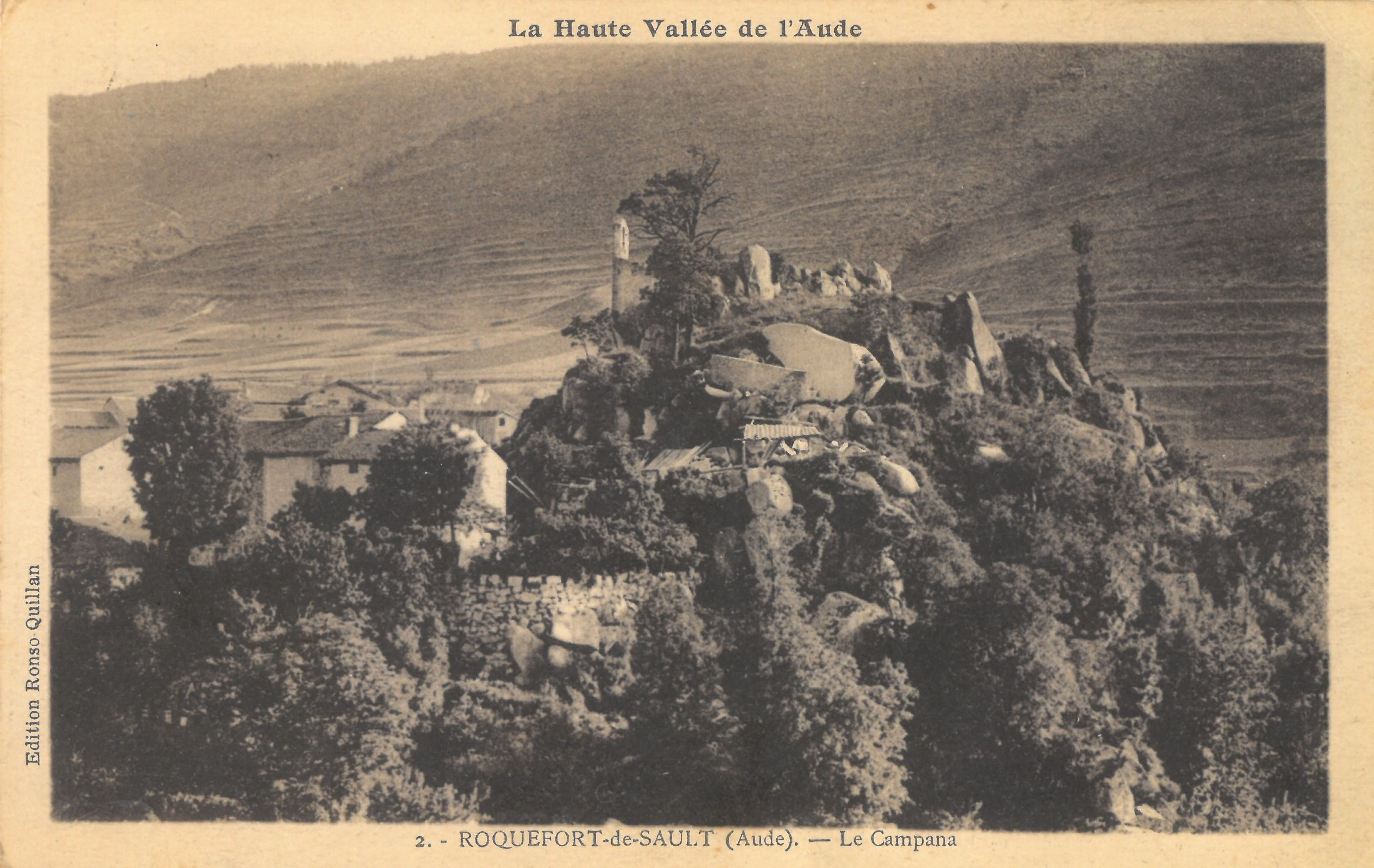 Roquefort de Sault : Le Campagna. Carte postale envoyée le 1 juillet 1934. Édition Ronso Quillan.